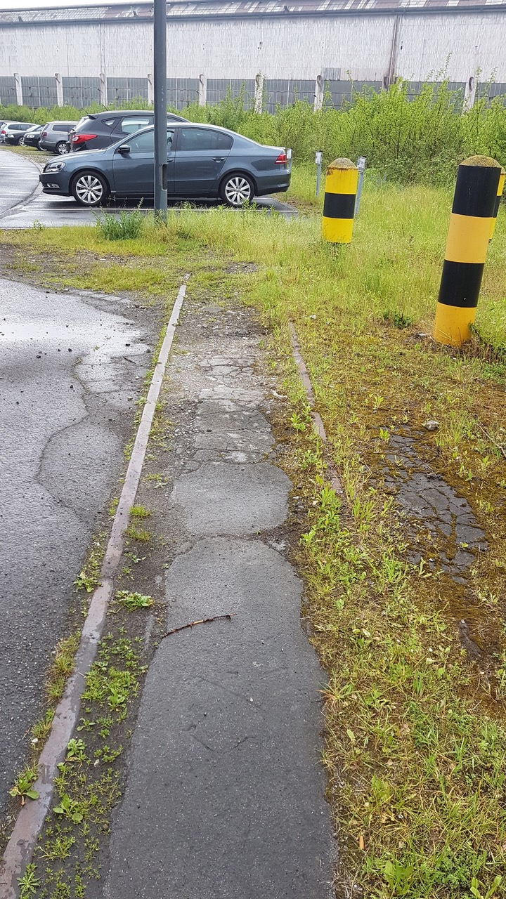 Gleisrest